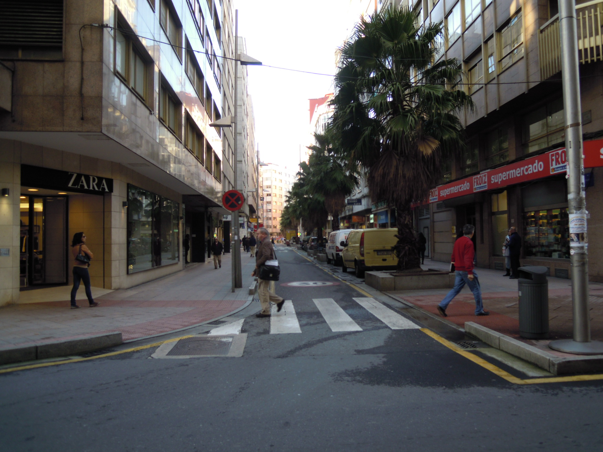 Rúa de Sagasta de Pontevedra; cruzamento coa rúa de Benito Corbal.